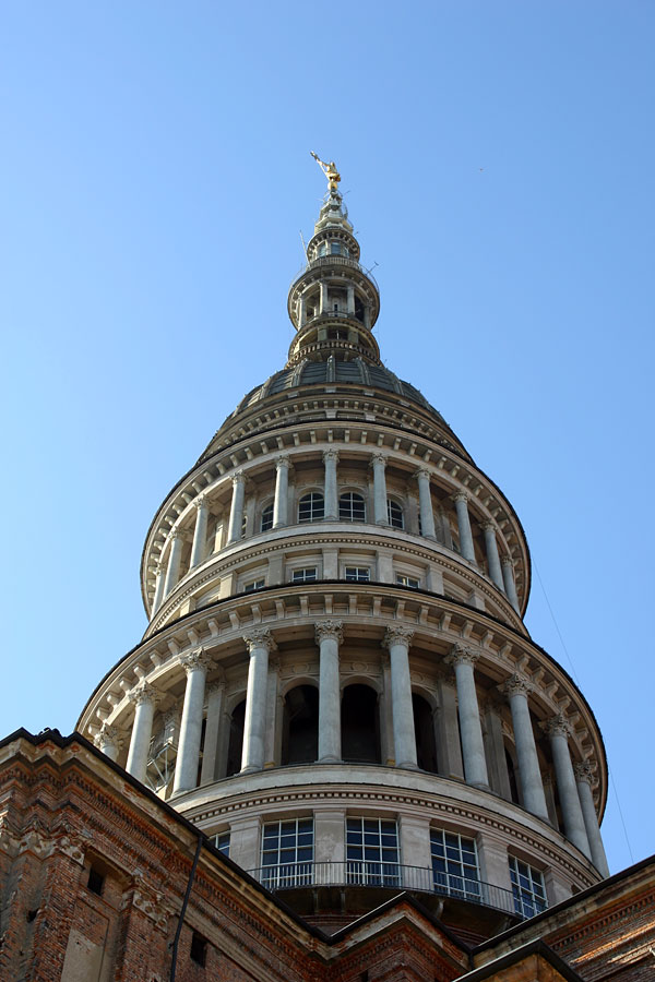 La cupola della Basilica di San Gaudenzio a Novara.